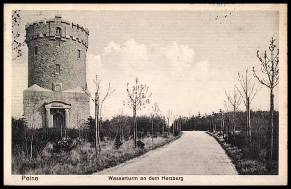 Postkarte mit Fotografie des 1908 gebauten Wasserturms im Peiner Herzberg